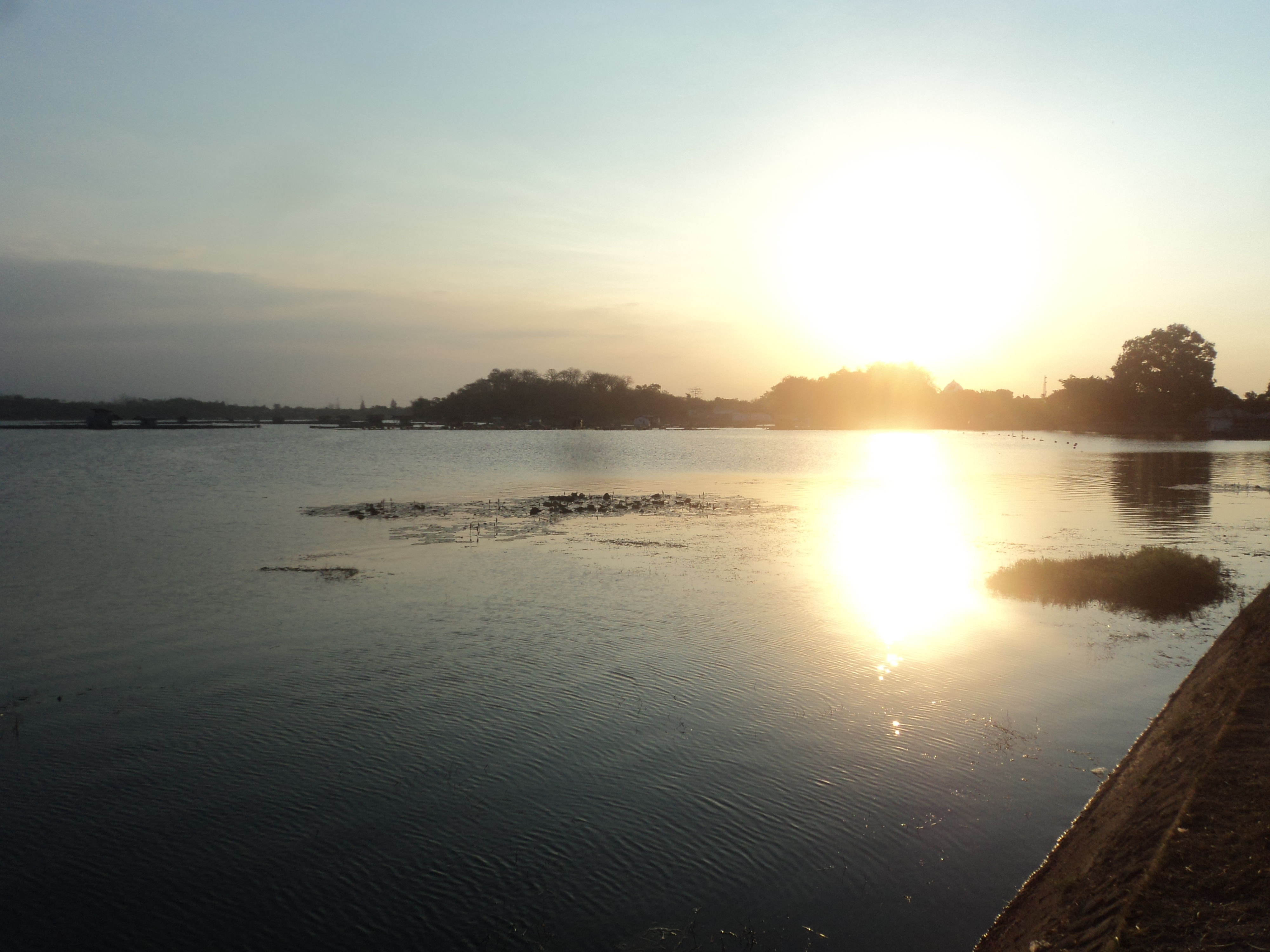 ranu garti sore hari bulan puasa